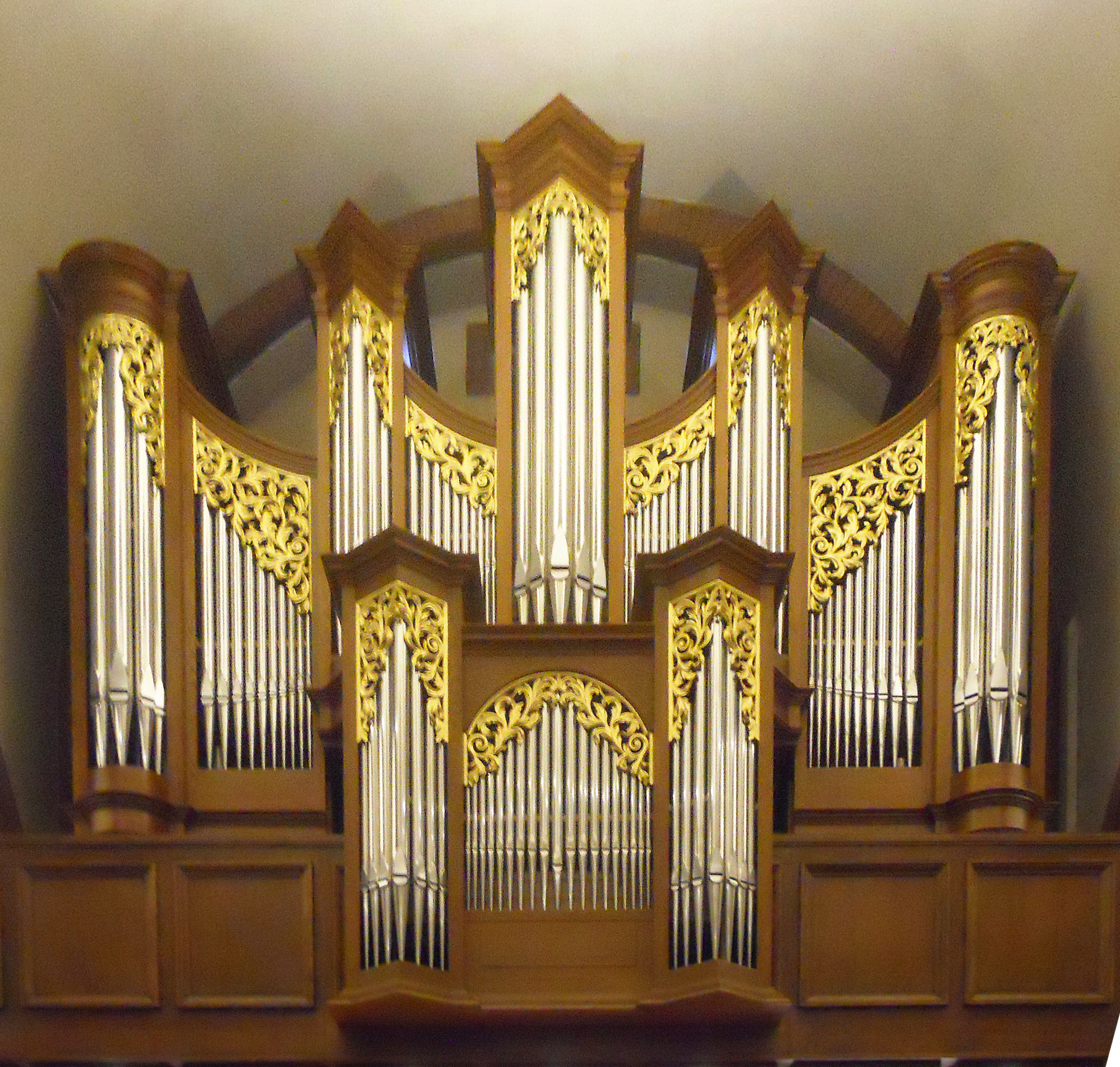 L'organo a canne, costruito da Francesco Zanin nel 2008 (32/II+P).